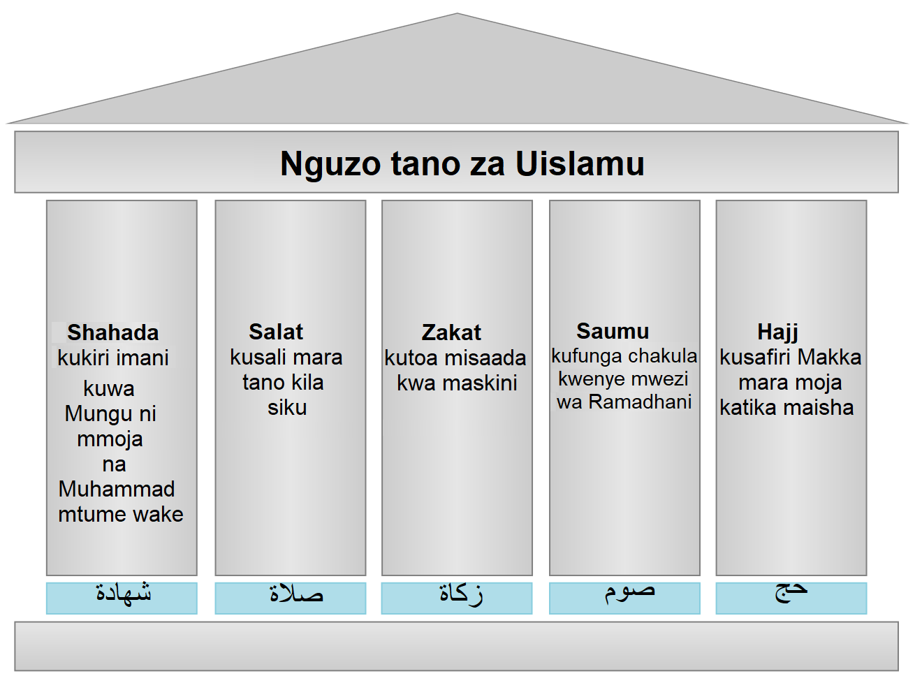 Kiswahili: Nguzo tano za Uislamu yaani ibada tano zilizotajwa na Muhammad katika hadithi ya Jibril